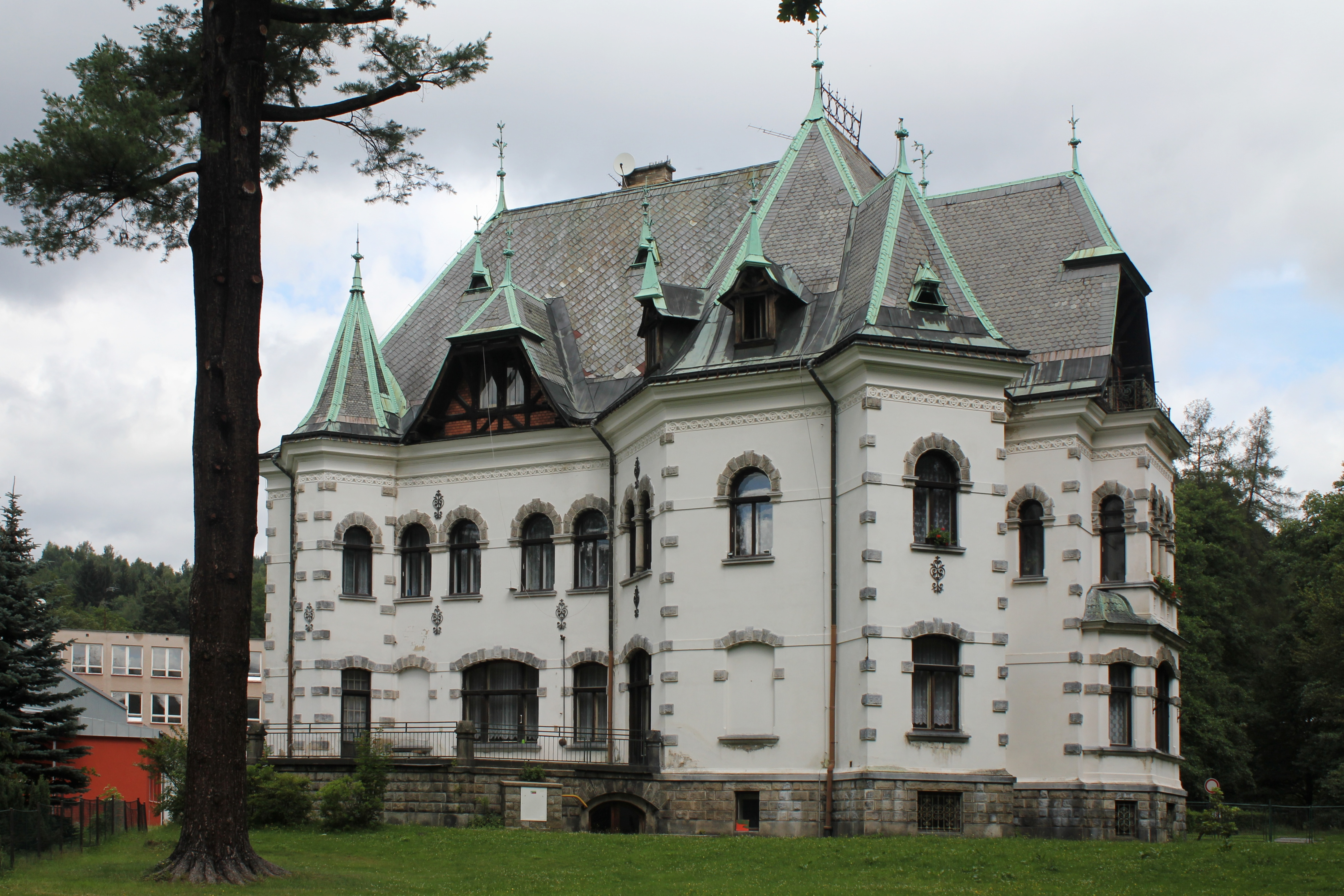 Riedlova vila, Desná